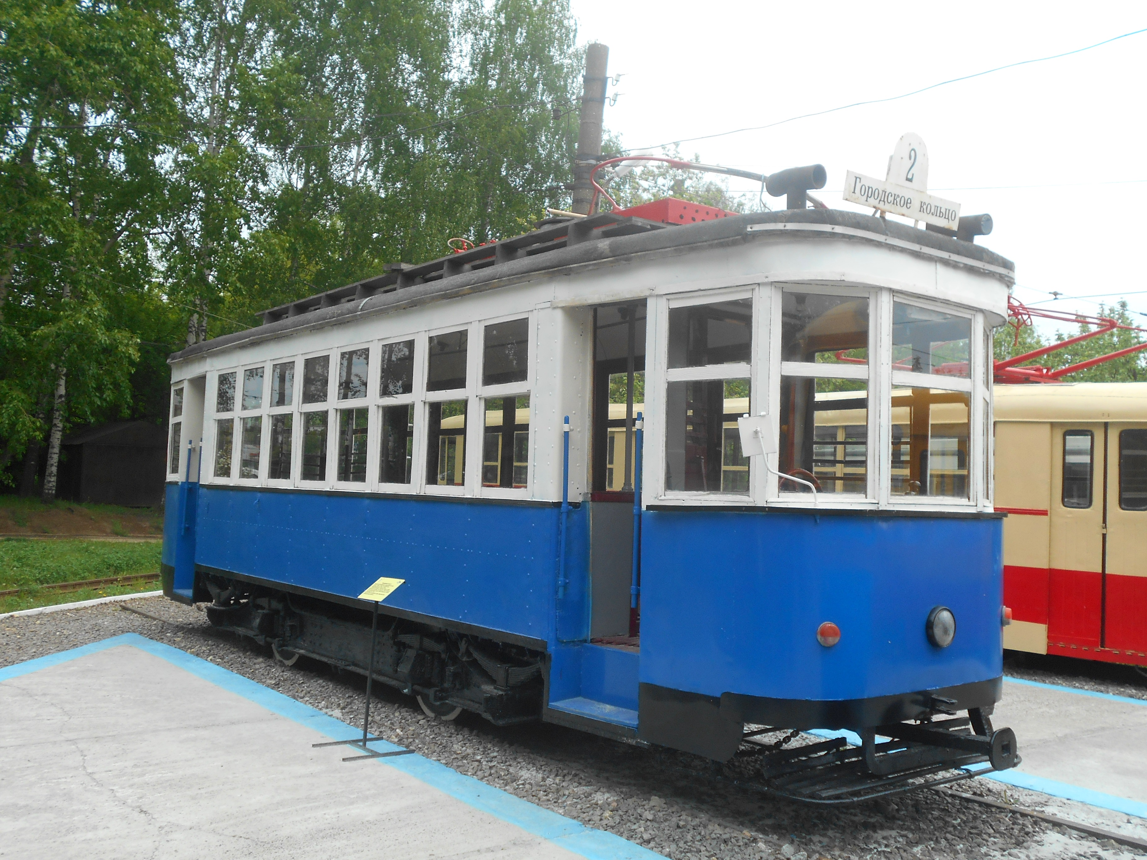 Музейный трамвай типа "Х" в Нижнем Новгороде